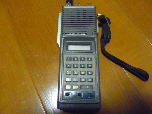 八重洲無線製のアマチュア無線機